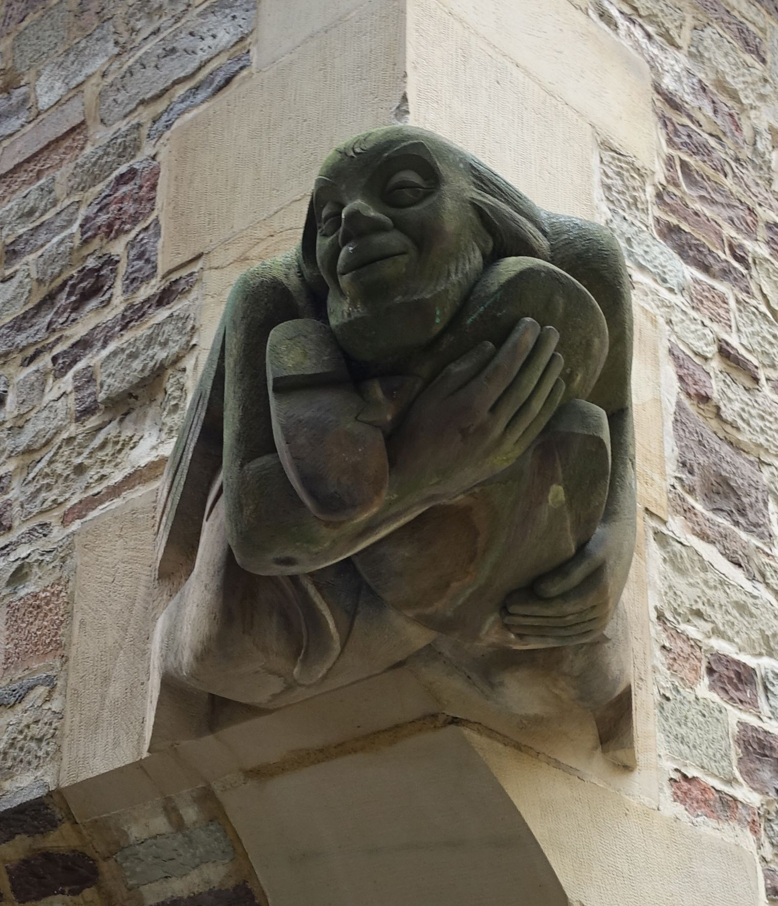 Skulptur des Stuttgarter Hutzelmännleins nach Eduard Mörikes Novelle „Das Stuttgarter Hutzelmännlein“, an einer versteckten Ecke des Stuttgarter Fruchtkastens.